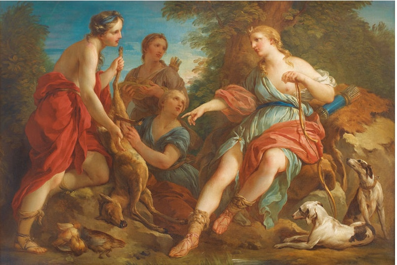 Tableau de dessus-de-porte du musée Rodin, anciennement hôtel Moras. Le financier Abraham Peyrenc de Moras en a fait la commande à François Le Moyne (1688-1737), avec trois autres tableaux pour décorer les dessus-de-porte du salon ovale. Ils représentent les quatre points du jour, les scène sont tirées des Métamorphoses d'Ovide.